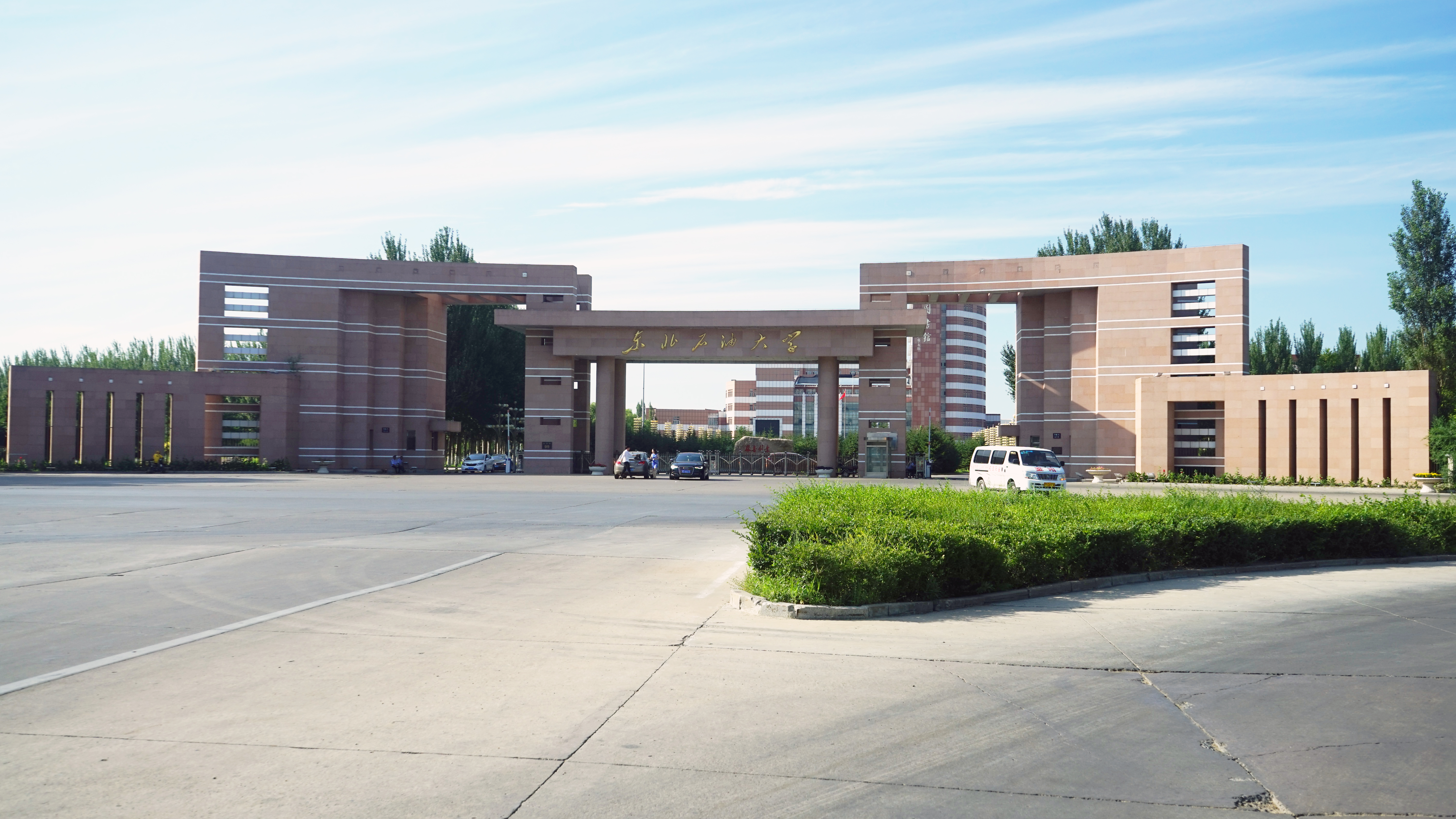 东北石油大学校门